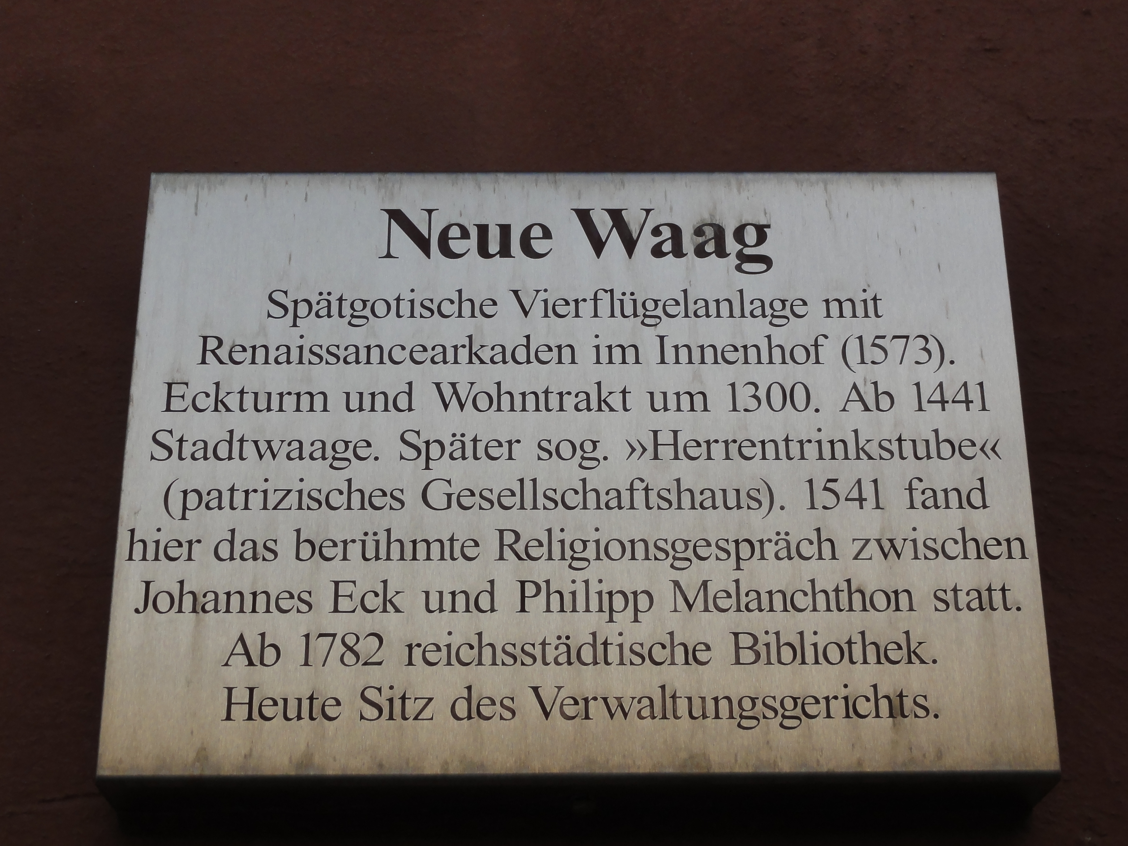 Regensburg - Neue Waag (Schild)